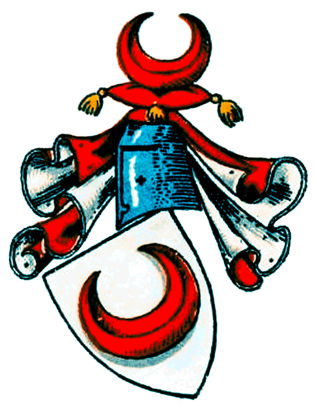 Stammwappen der von Woellwarth